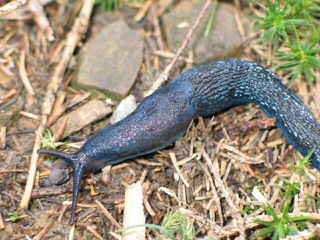 Pomrów błękitny; zdjęcie udostępnione przez Dixi (c) 2005 na bazie GNU FDL